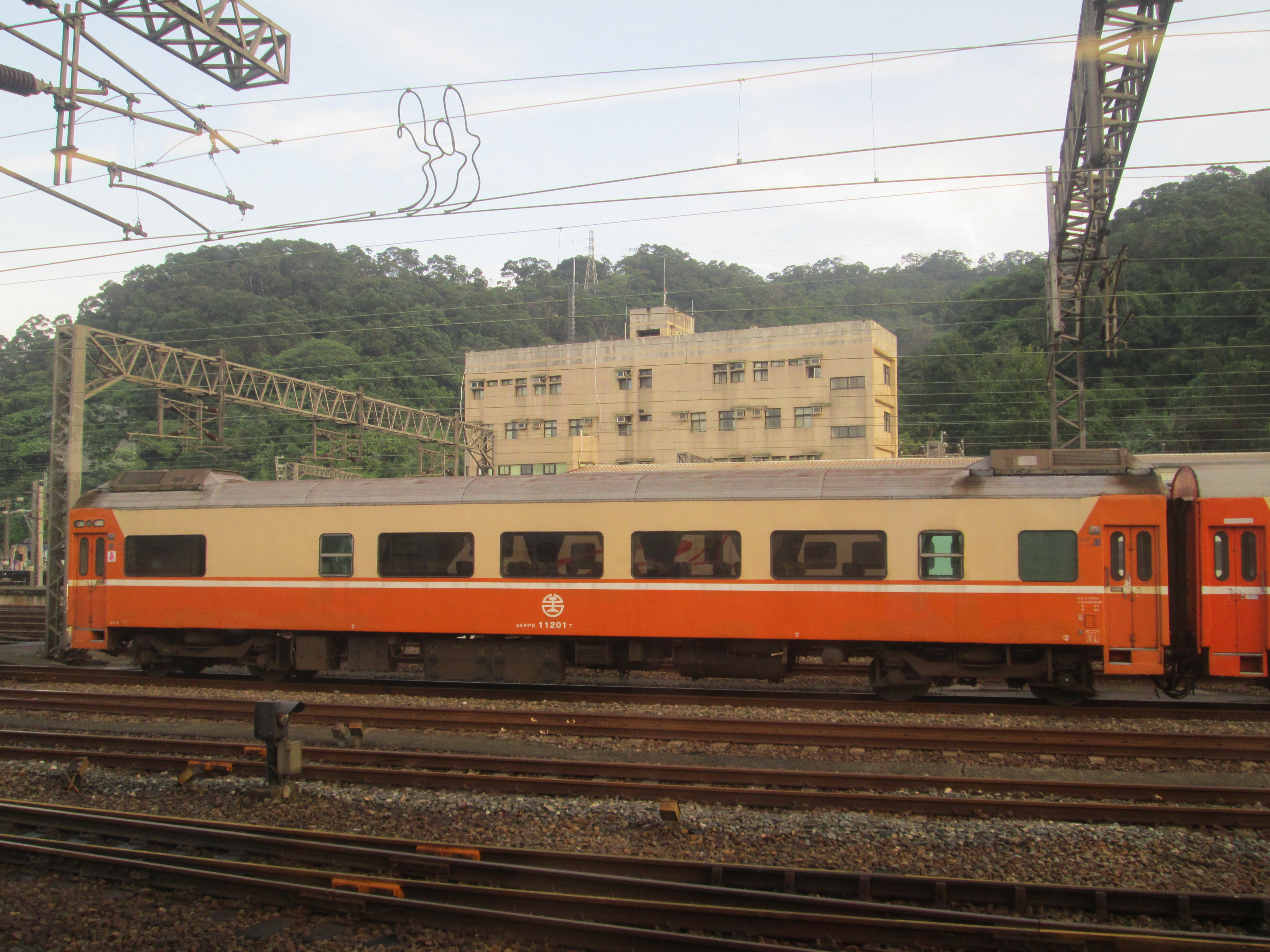 臺灣鐵路管理局莒光號客車35FPK11201T與樹林調車場行控中心。